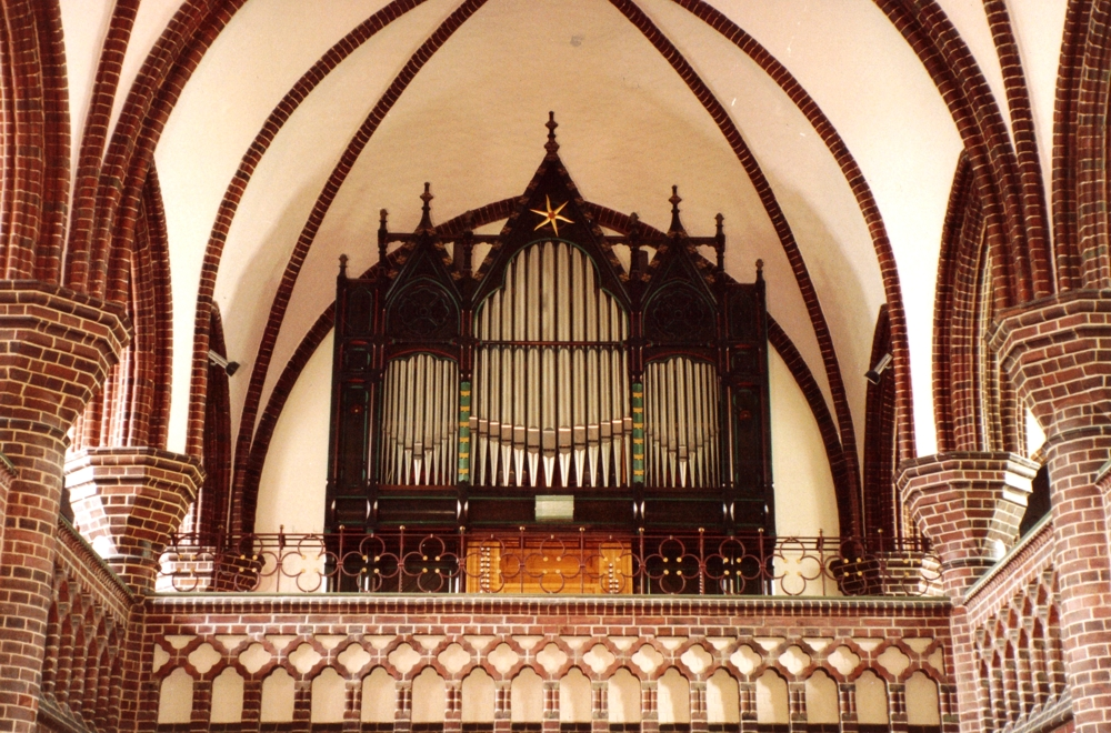 Orgel der ev.-luth. Erlöser-Kirche in Hannover-Linden. Gehäuse: P. Furtwängler & Söhne, Orgelwerk: Emil Hammer Orgelbau